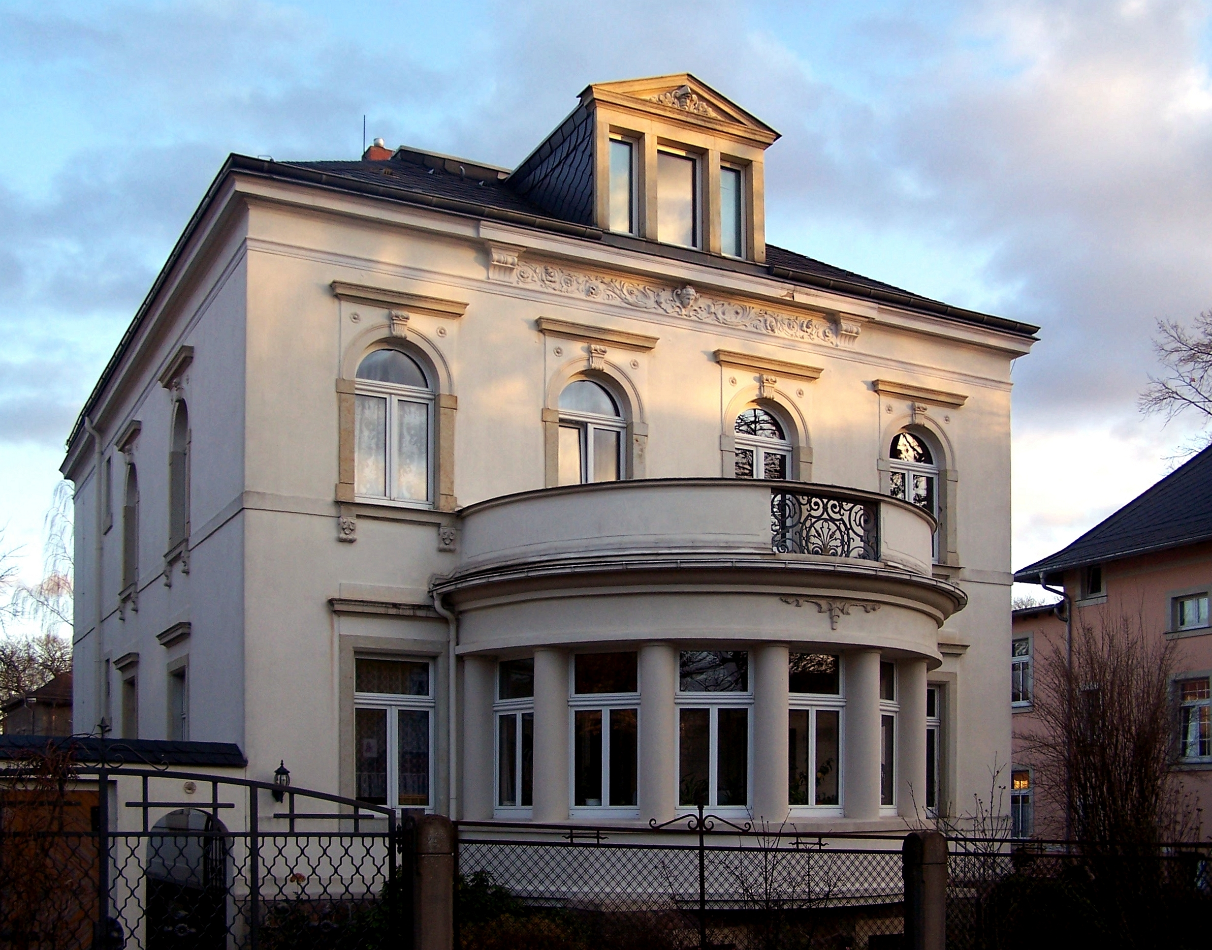 Rosenstr. 16 in Radebeul